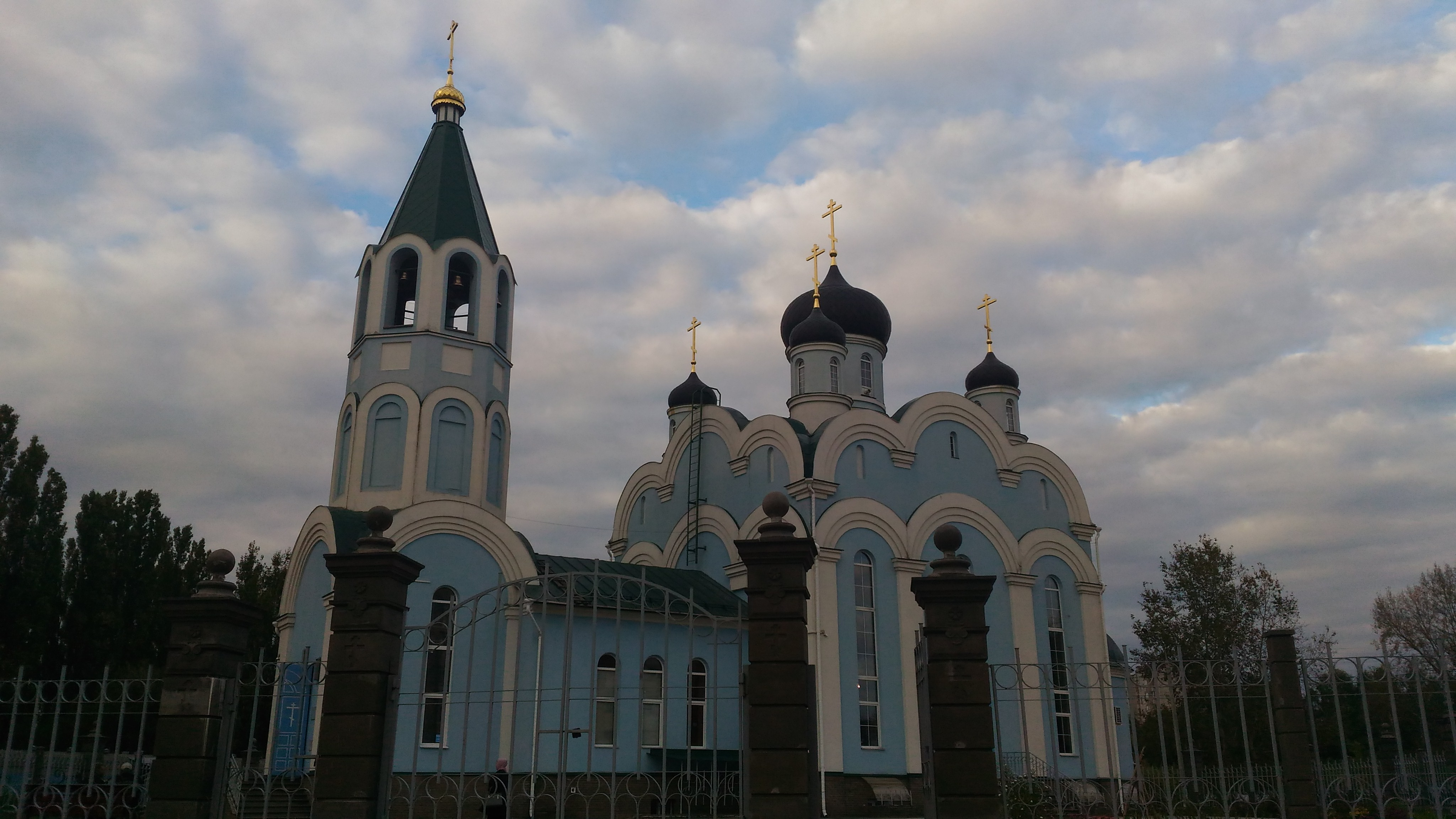 Нижний Новгород, ул. Люкина, Храм иконы Божией Матери «Скоропослушница»